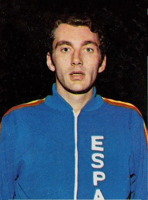 CAMPIONI dello SPORT 1973/74-Figurina n.272- LUYK - PALLACANESTRO -Rec